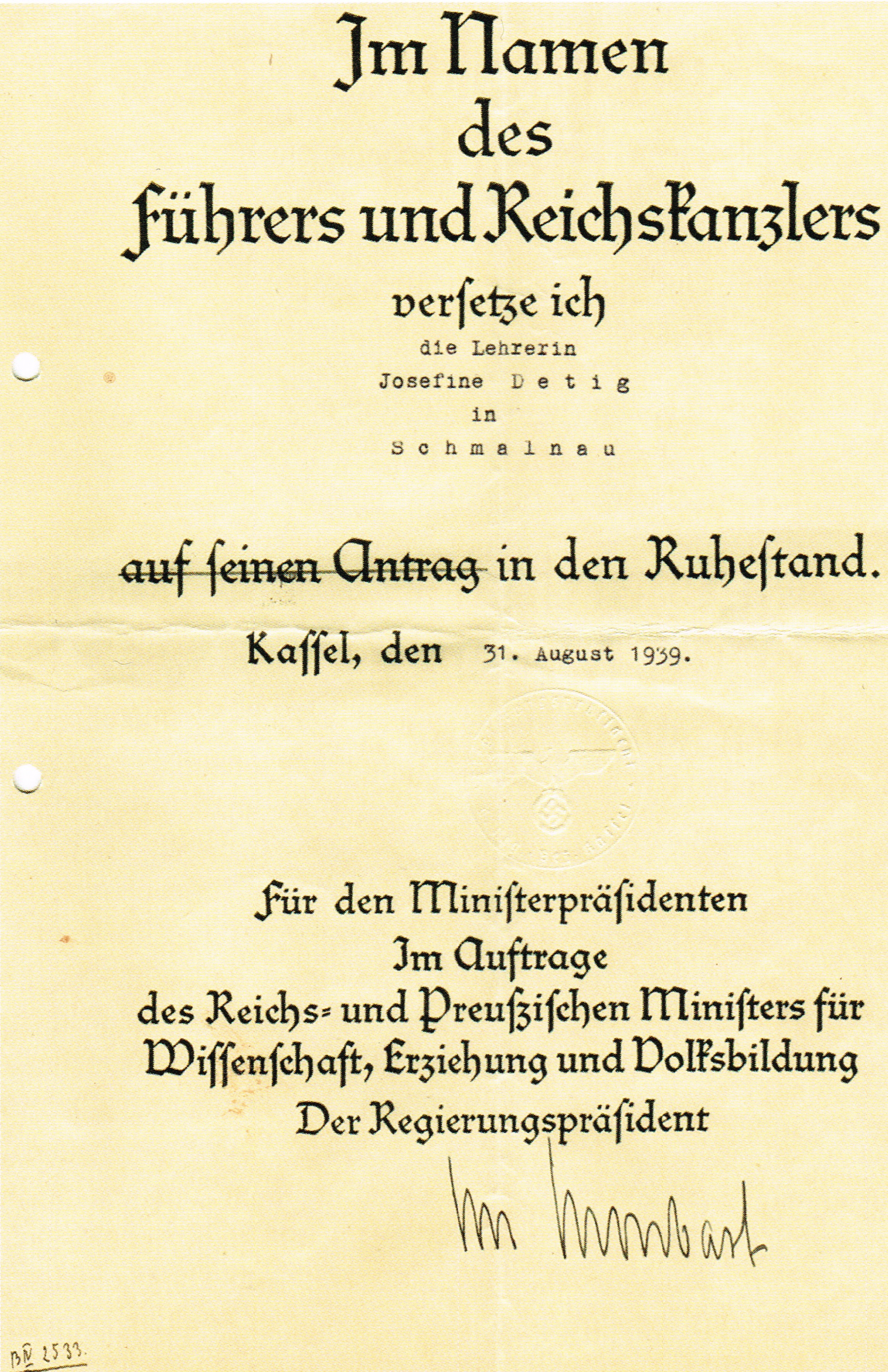 Entlassungsurkunde von Josefine Detig "Im Namen des Führers und Reichskanzlers" in den einstweiligen Ruhestand 1939 (Grund war "politische Unzuverlässigkeit")